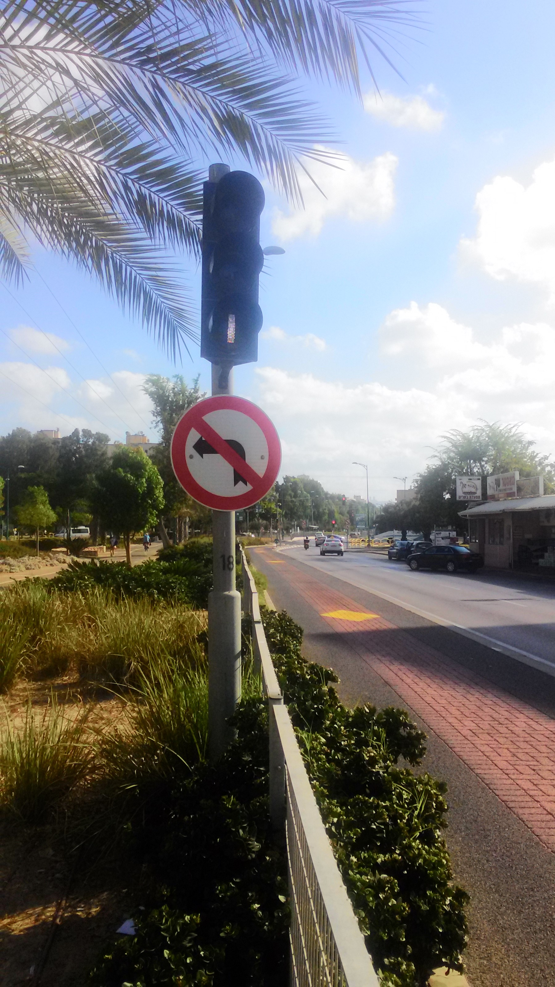 רמזור המיועד למטרונית